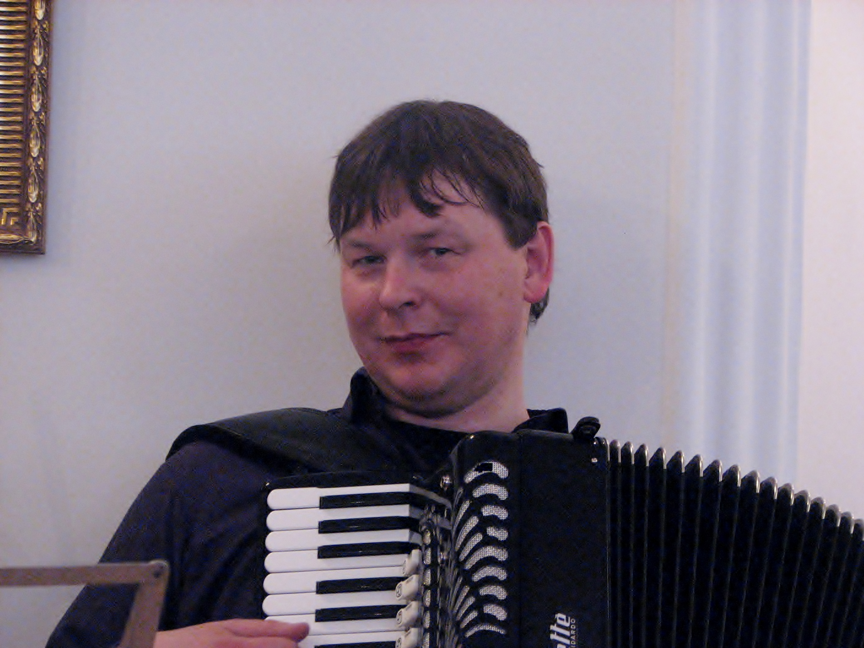 Jaak Lutsoja Vanalinna Kirjandusklubis Eia Uusi raamatuesitlusel akordionit mängimas